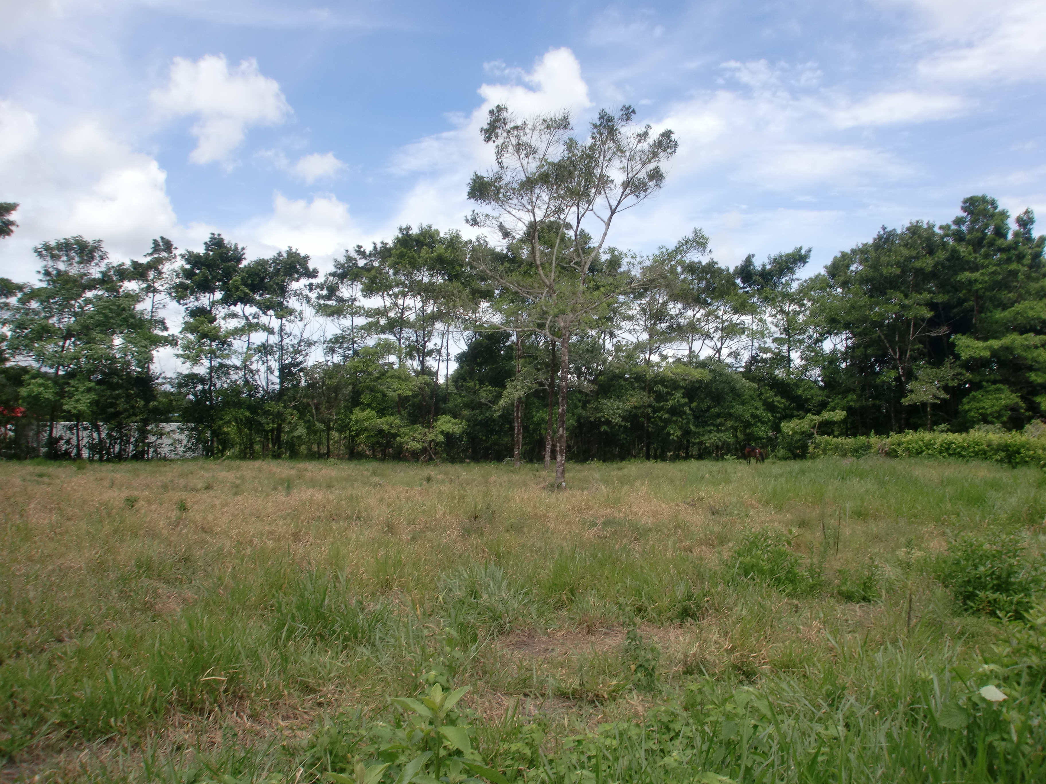 Villavicencio, Meta, Colombia